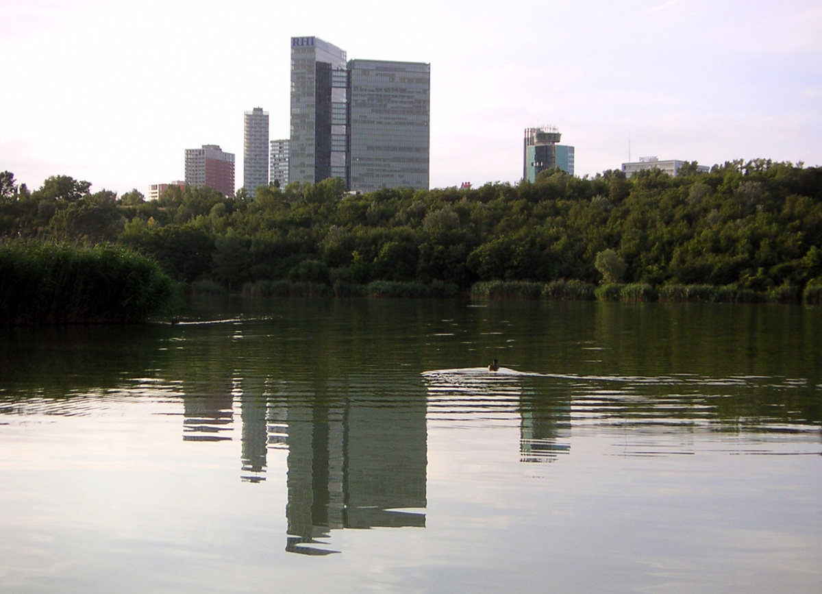 Wienerbergcity vor Teich, selbst fotografiert am 26.07.2005, abends